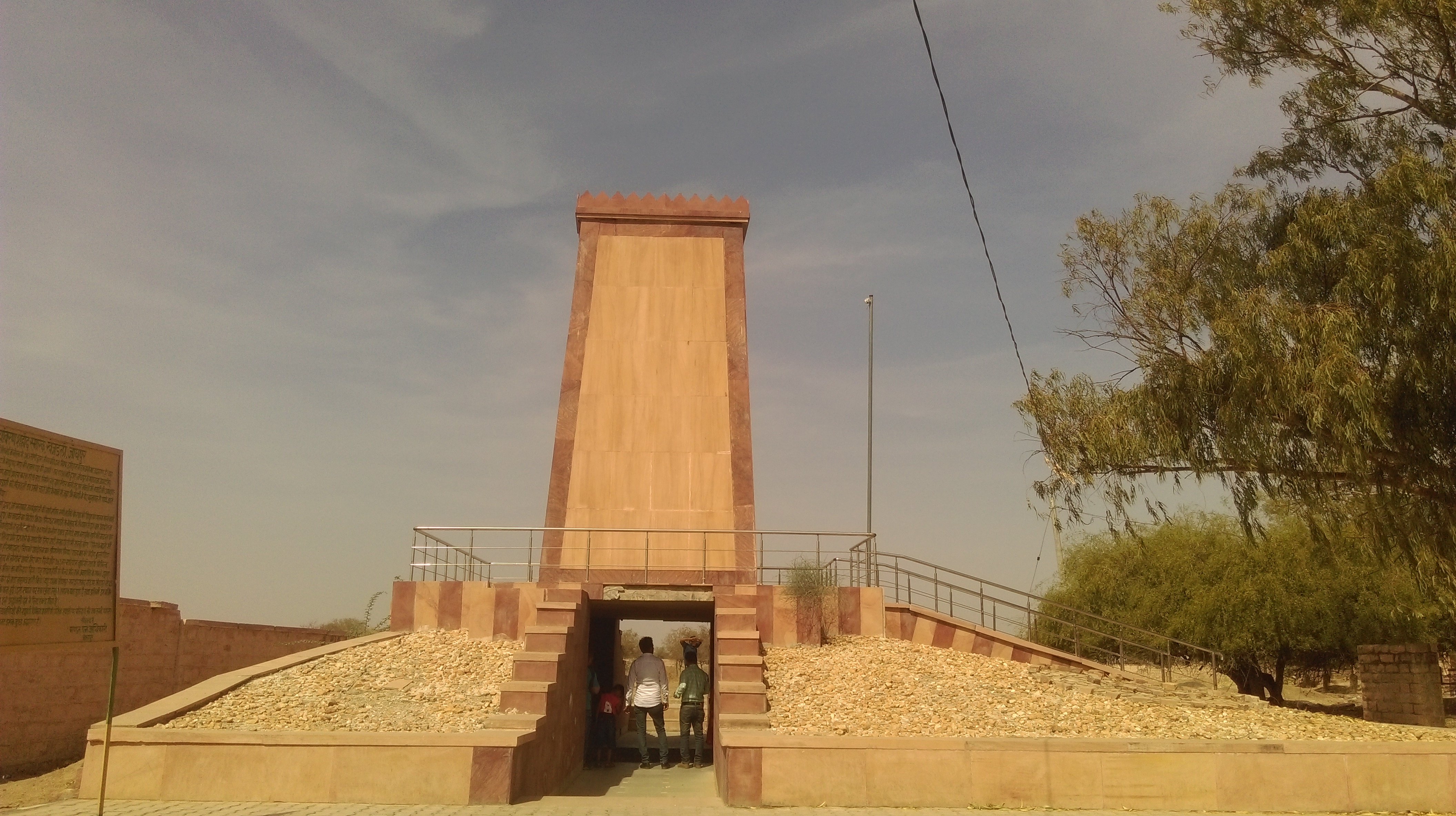 यह घटना सन् 1730 में जोधपुर नरेश अजीतसिंह के पुत्र अभयसिंह के समय में घटित हुई जिसे 'खेजडली के खंडाणे' के नाम से भी जाना जाता है।